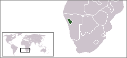 Description:Carte de localisation du bantoustan du Damaraland, Namibie Auteur:Rémih